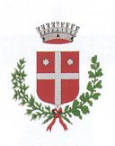 Stemma del Comune di Motta di Livenza